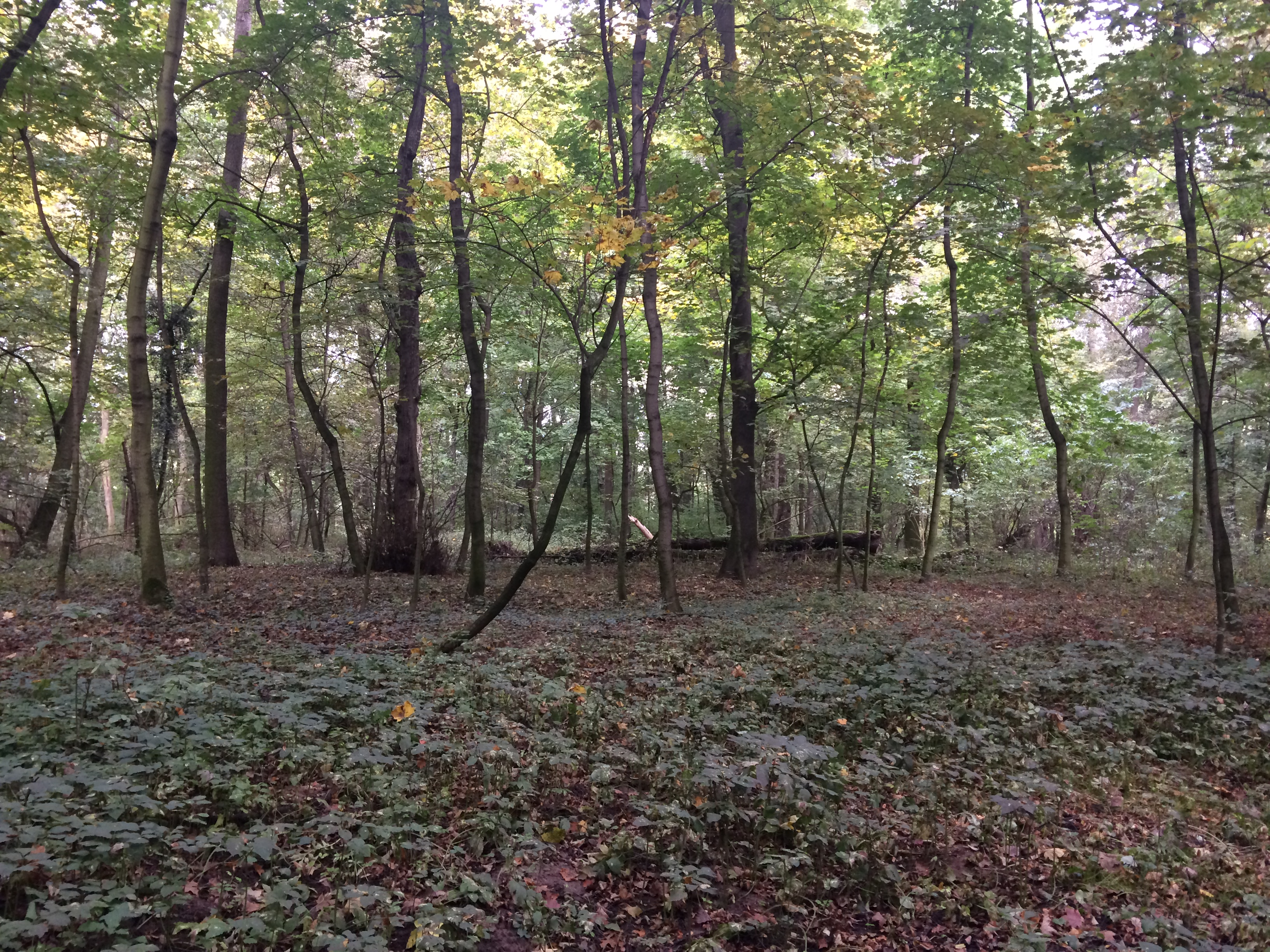 Podrost Hluchov